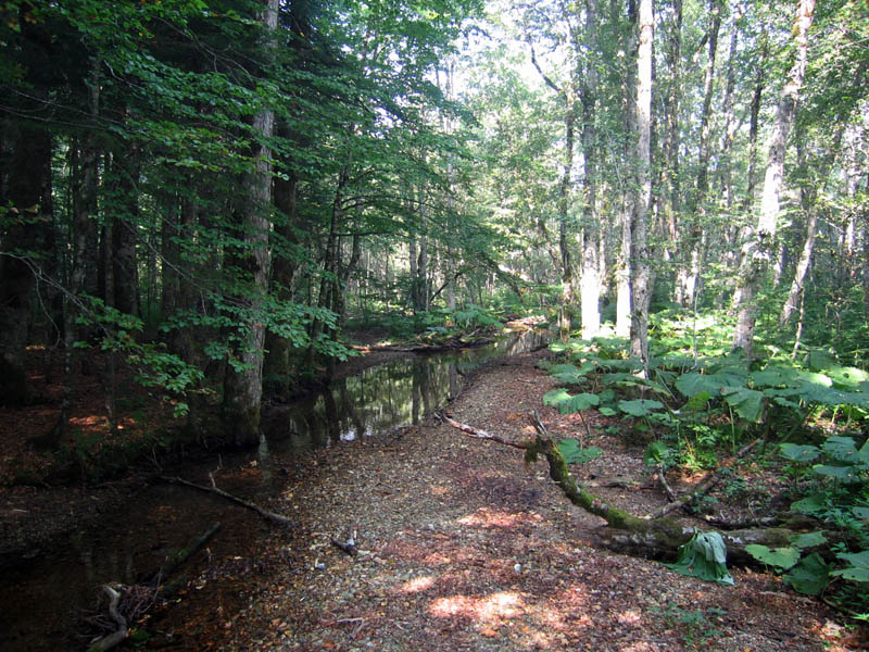 Biogradska reka